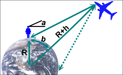 Schemazeichnung zur Berechnung der Sichtbarkeit bzw. max. Footprints eines hoch fliegenden Objekts. Siehe Sichtweite bzw. footprint. Diagram for calculation of visibility and footprint of satellites. Zeichner: Anton (2006) Related diagram: Image:Visibcurp.png